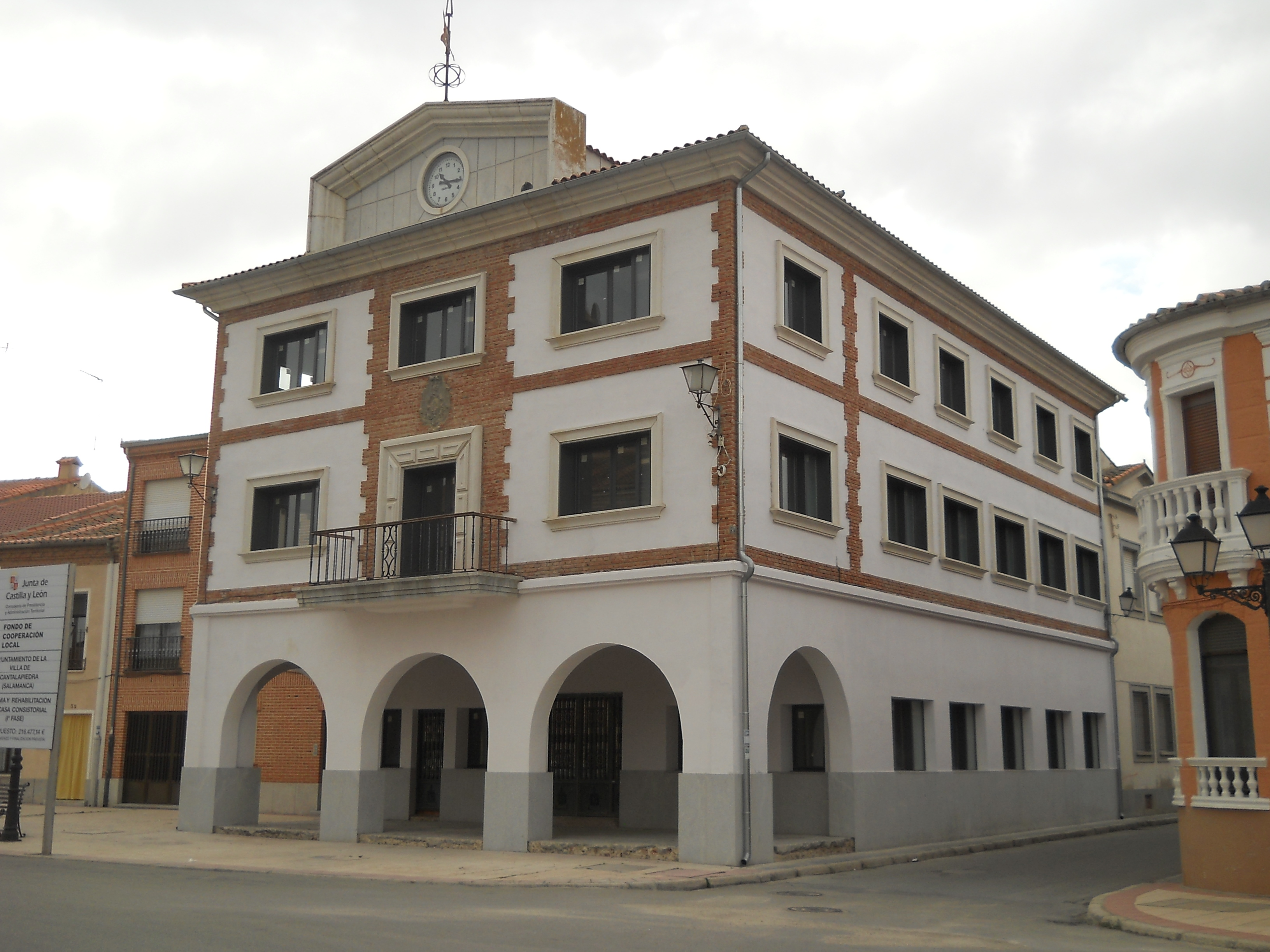 Municipio di Cantalapiedra, Salamanca, Spagna